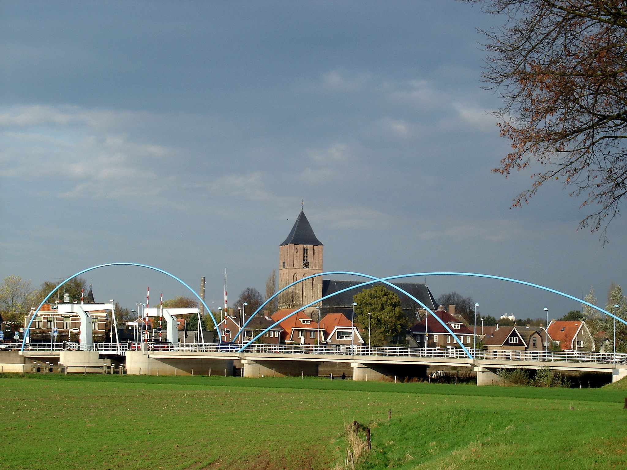 Blik op Dalfsen.